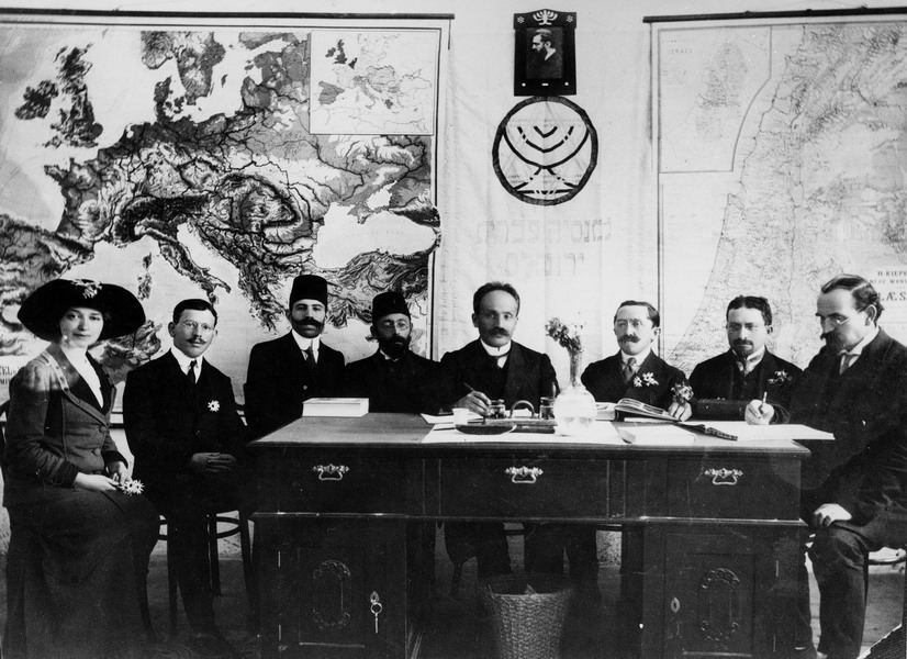 מורי הגימנסיה העברית בירושלים ערב מלחמת העולם הראשונה. בקצה הימיני יושב יצחק יעקבי בתור מזכיר הגימנסיה.